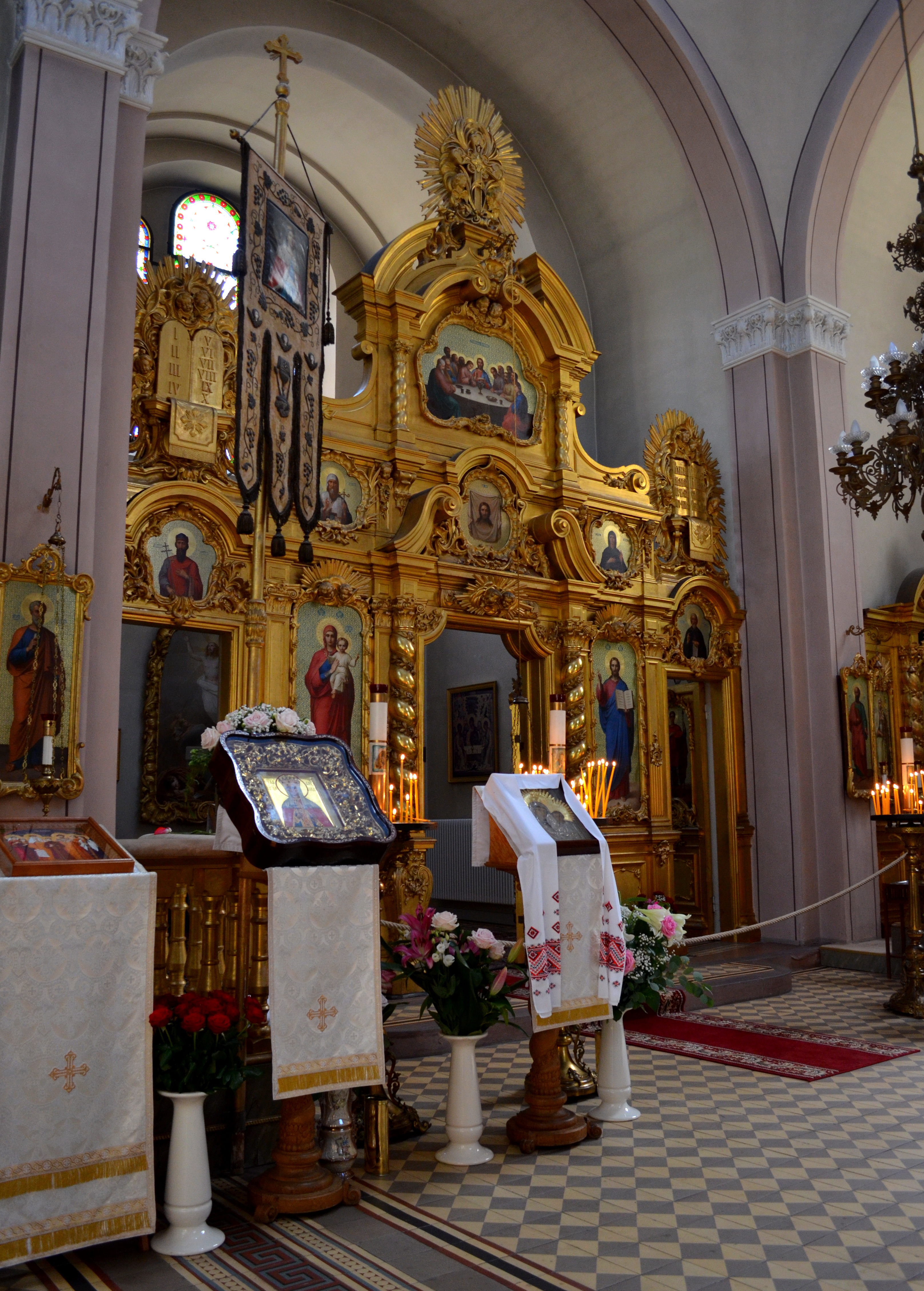 Bad Ems - Kerk van de Hl. Alexandra, hoofdaltaar